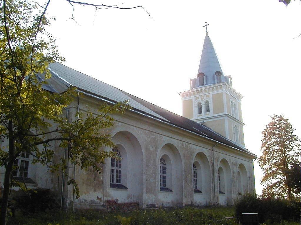 Sesavas baznīca 2000-09-02